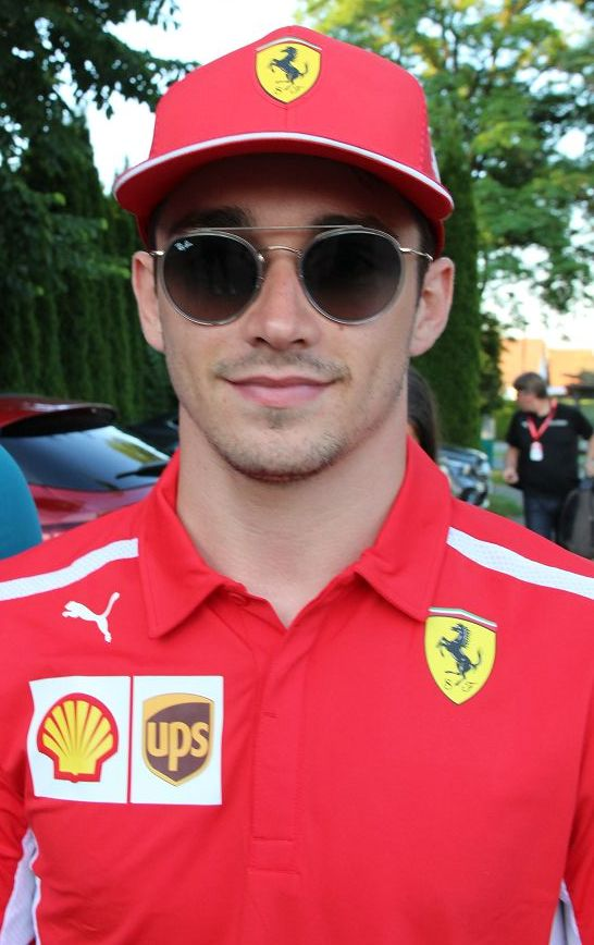 Formula 1 2019 / Schloss Gabelhofen